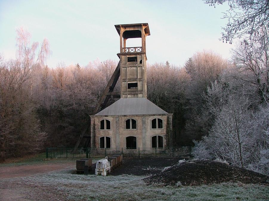 Stary szyb kopalniany w Ronchamp (Francja).